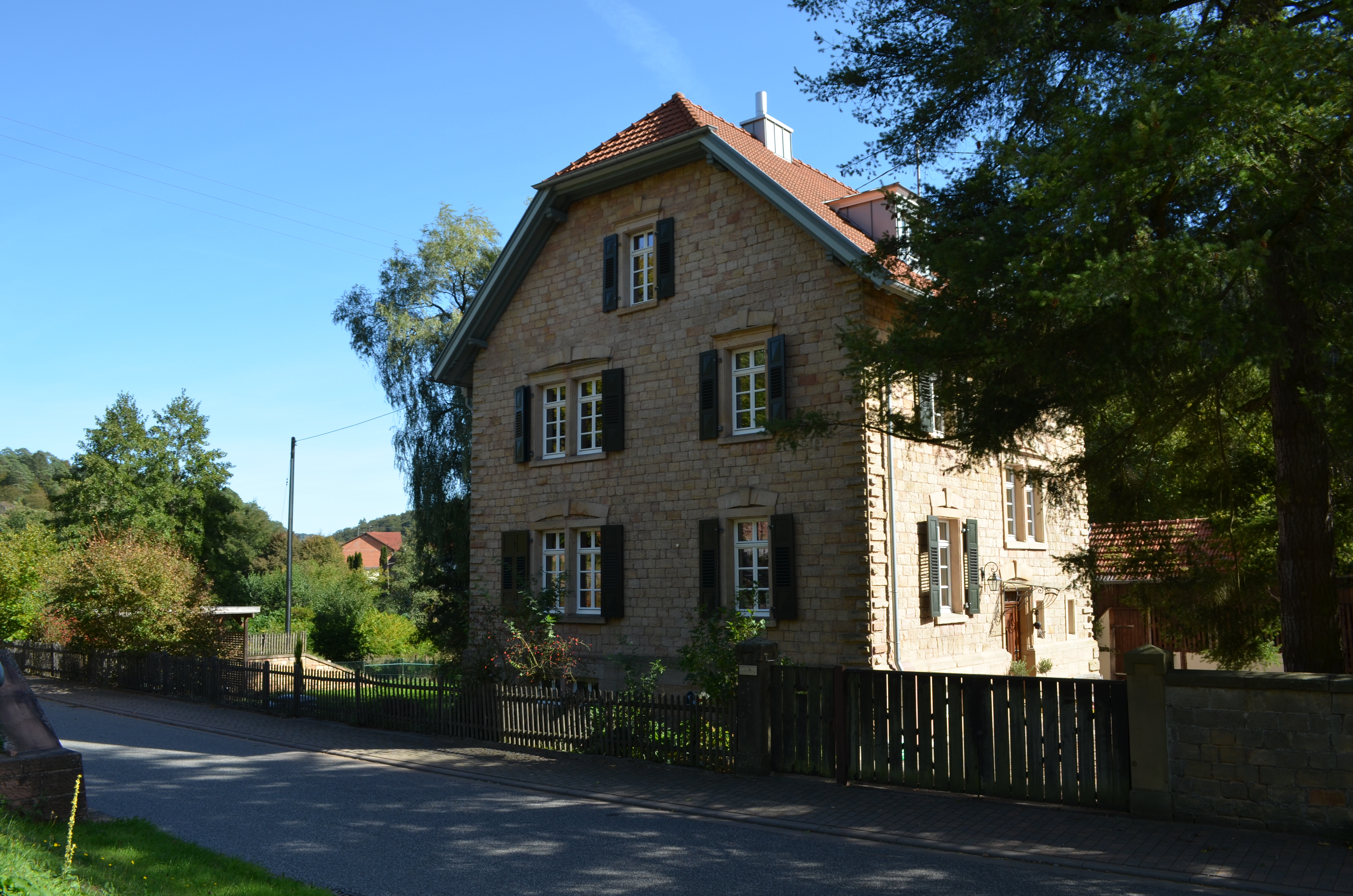 Ehemaliges Forsthaus Salzbachstraße 18 im Lemberger Ortsteil Langmühle; Dreiseithof, Bruchsteinwohnhaus mit Wirtschaftsgebäuden, schlichter Heimatstil, 1920er Jahre